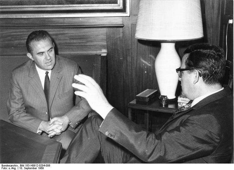 Zentralbild/12.9.1969/ Westberlin Chef der antikommunistischen Wühlzentrale in Westberlin von Schütz empfangen Der Westberliner Regierende Bürgermeister Schütz hat am 10.9.1969 den neu eingesetzten Leiter der illegalen Westberliner Wühlzentrale des Bonner Ministeriums für antisozialistische Tätigkeit, Ministerialdirektor Hermann Kreutzer (SP) (auf unserem Foto links), zu einem Antrittsbesuch empfangen. Kreutzer war im August 1969 vom Chef des Ministeriums für antisozialistische Tätigkeit, Wehner, während eines widerrechtlichen Westberlin-Aufenthaltes in sein Amt eingeführt worden. Kreutzers Aufgabe sei es, die von Westberlin ausgehende Aktivität gegen die DDR und andere sozialistische Länder zu Koordinieren und zu verstärken, hiess es bei Amtsantritt des ehemaligen Abteilungsleiters im Ministerium Wehners.